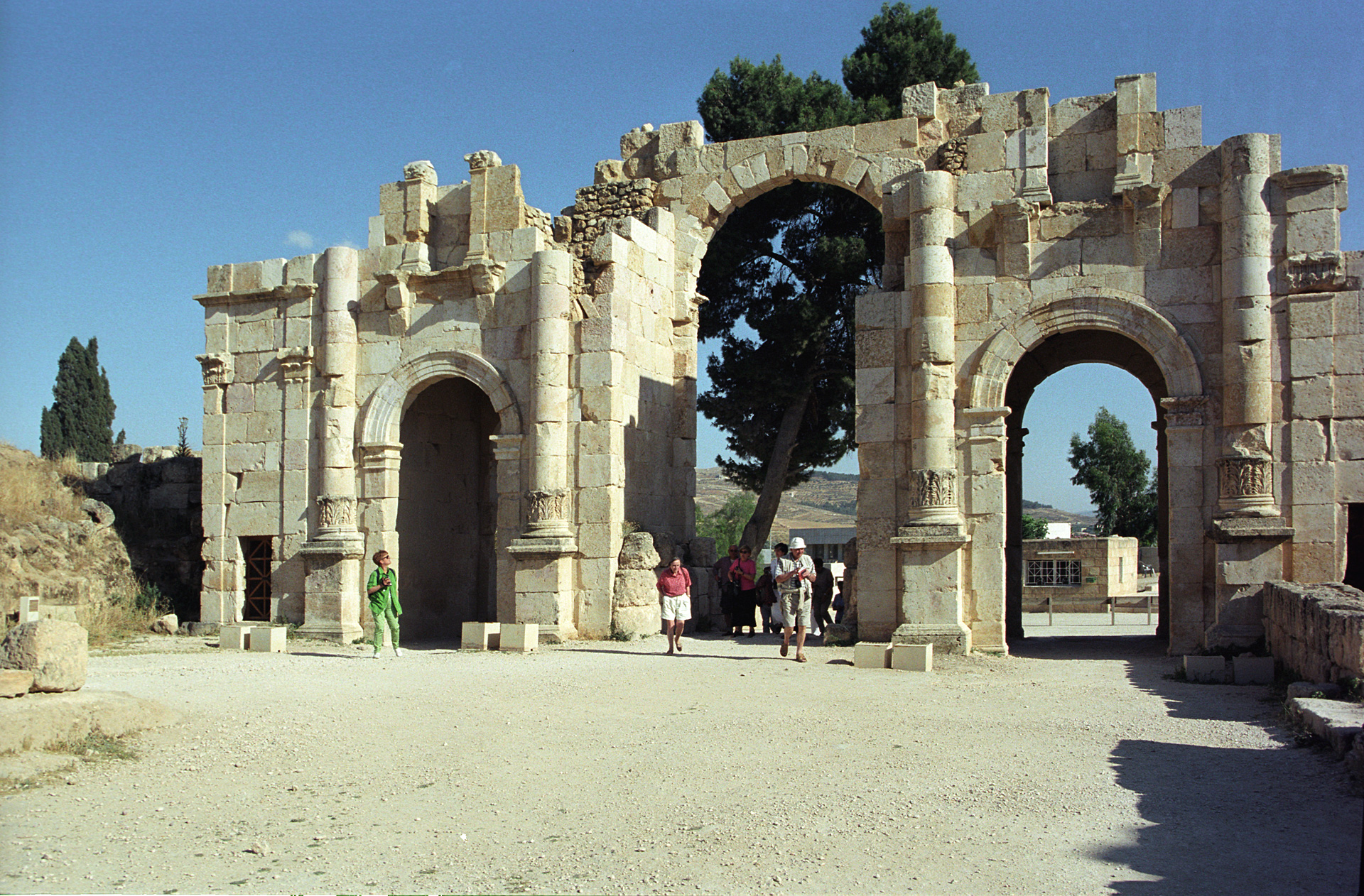 Jerash, Jordan